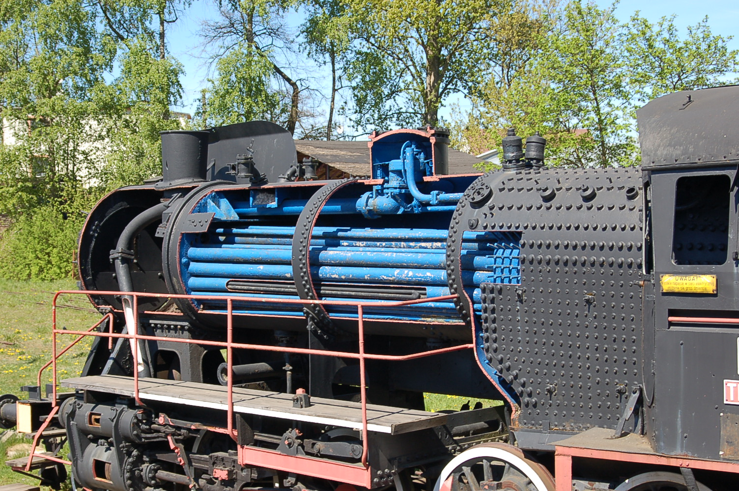 TKt48-179 locomotive in Skansen Parowozownia Kościerzyna